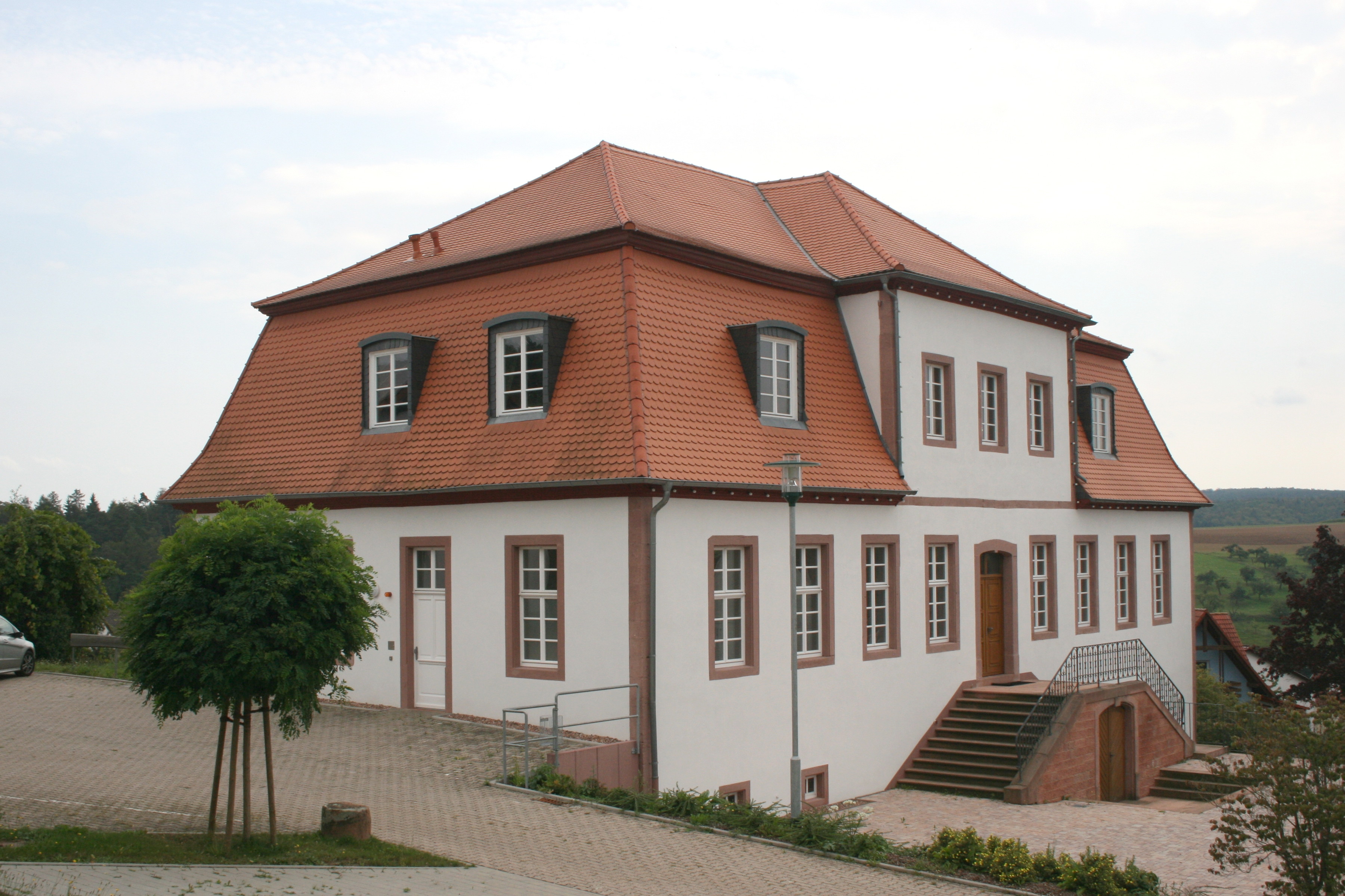 Pretlack'sches Palais in Rimhorn, Gemeinde Lützelbach im Odenwaldkreis, Hessen. Ansicht des Herrenhauses, Straßenseite.